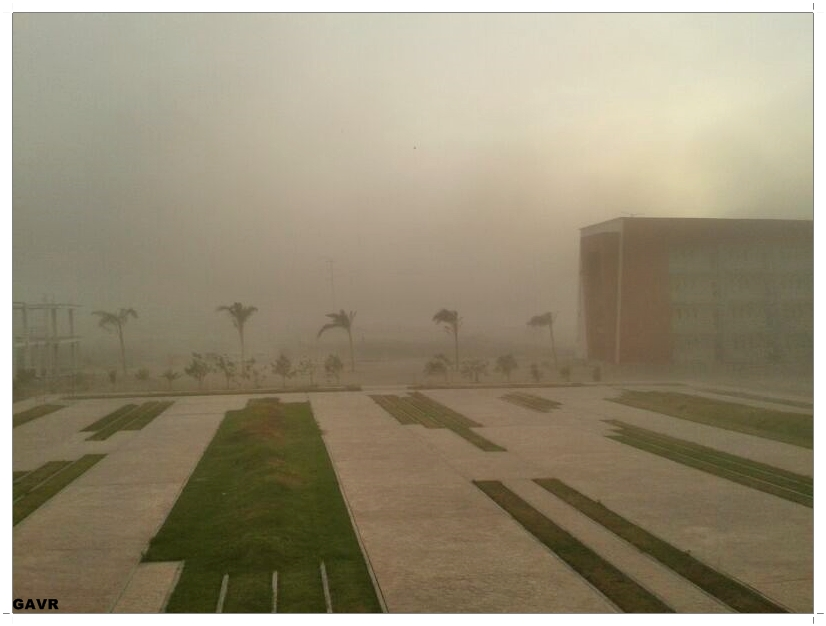 tolvanera